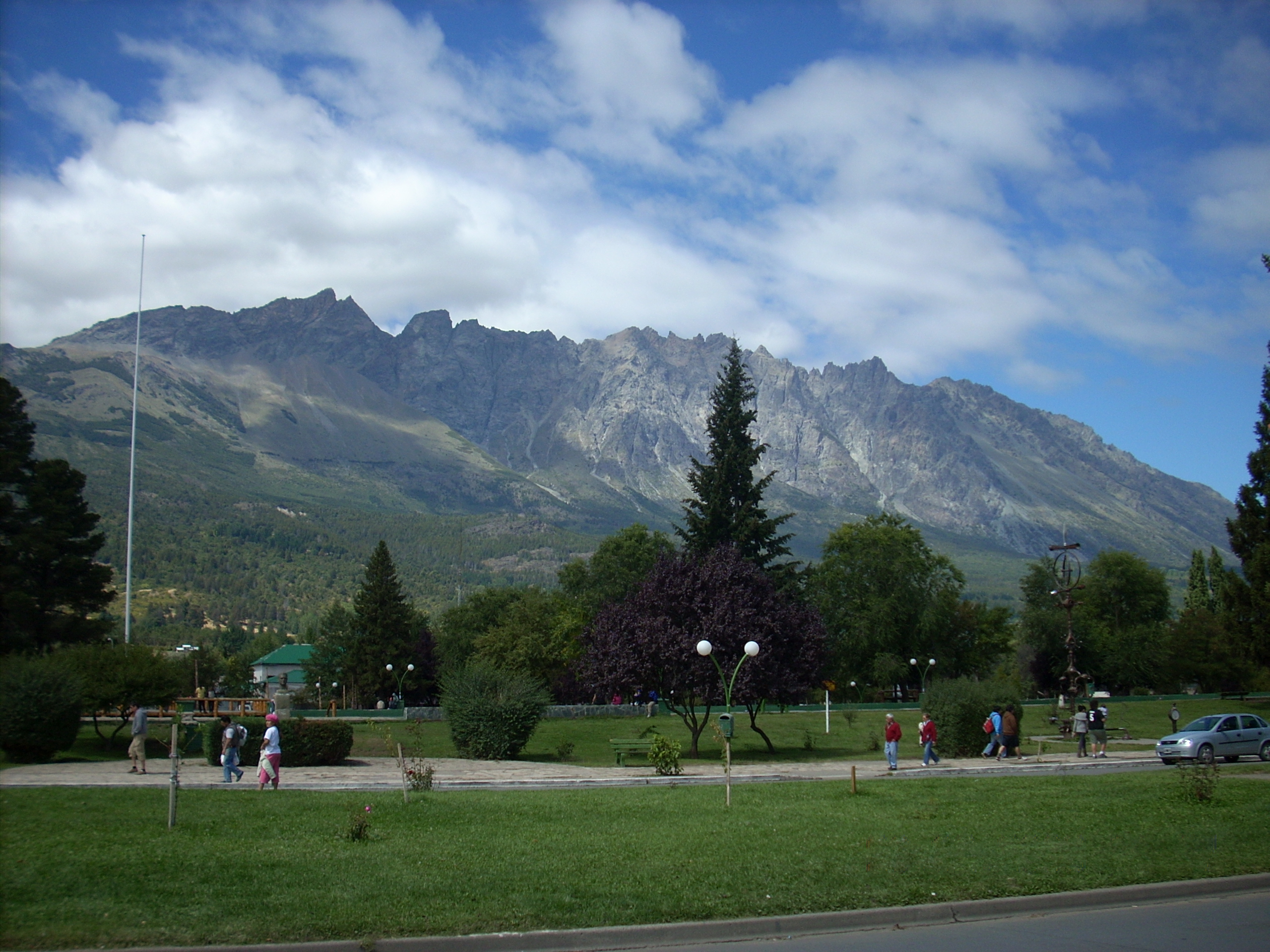 Piltriquitron desde El Bolsón